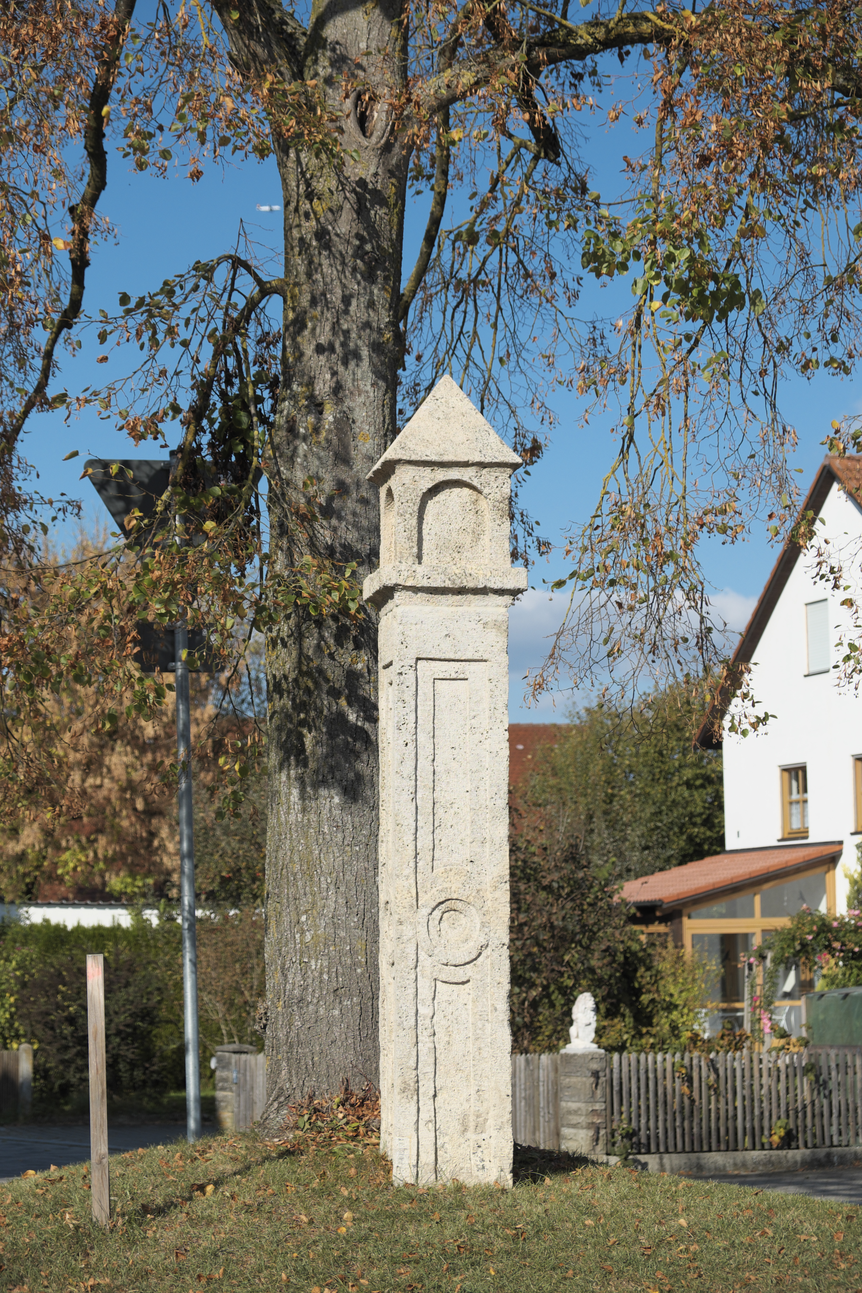 Bildstock in Kreuzholzhausen (Bergkirchen) im Landkreis Dachau (Bayern/Deutschland)